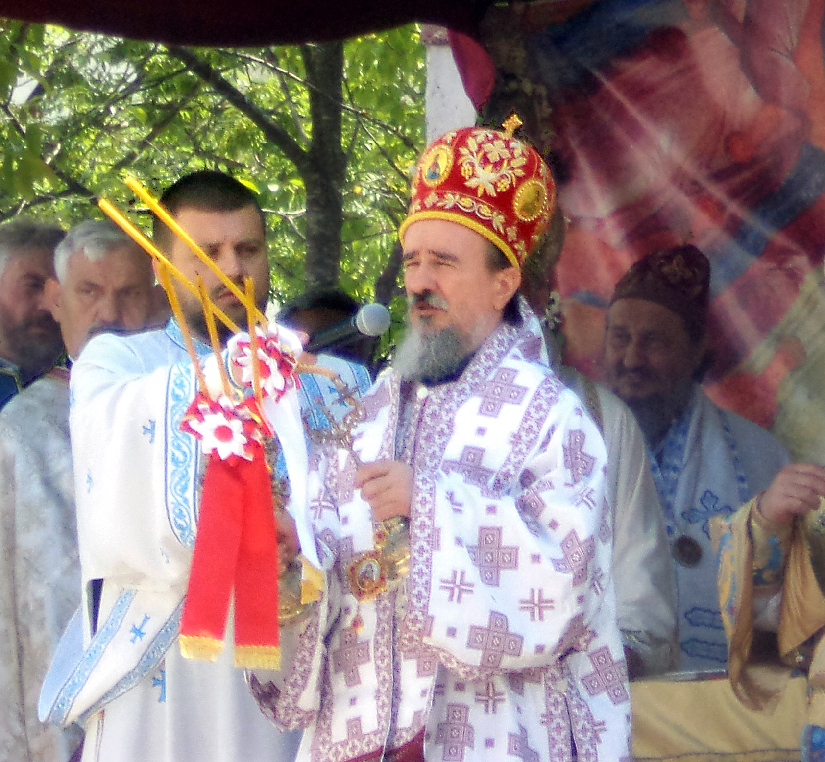 Атанасије (Ракита), епископ бихаћко-петровачки. Сликано у Невесињу 9. јуна 2013. на прослави 1700 година Миланског едикта